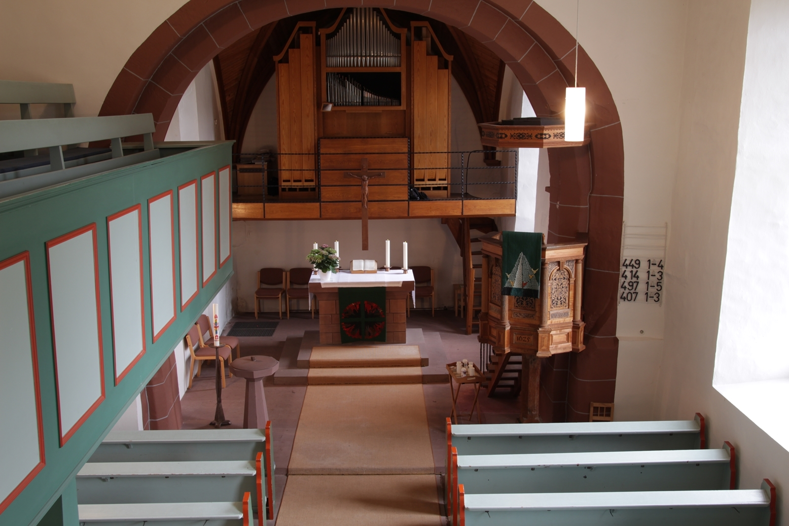 Evangelische Kirche Eichelsdorf, Nidda, Hessen, Deutschland